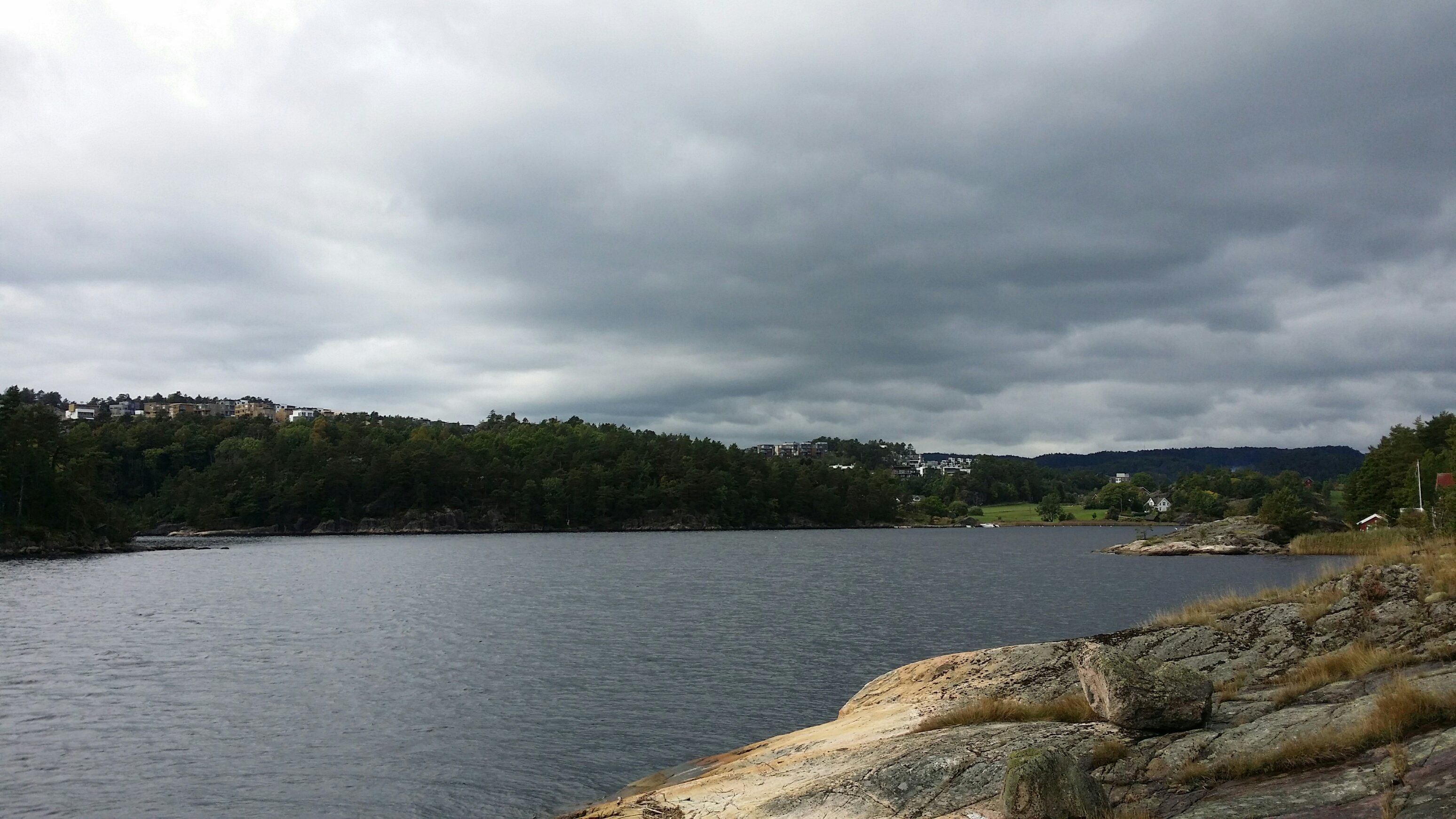 Justnesskauen sett fra Justnesøya